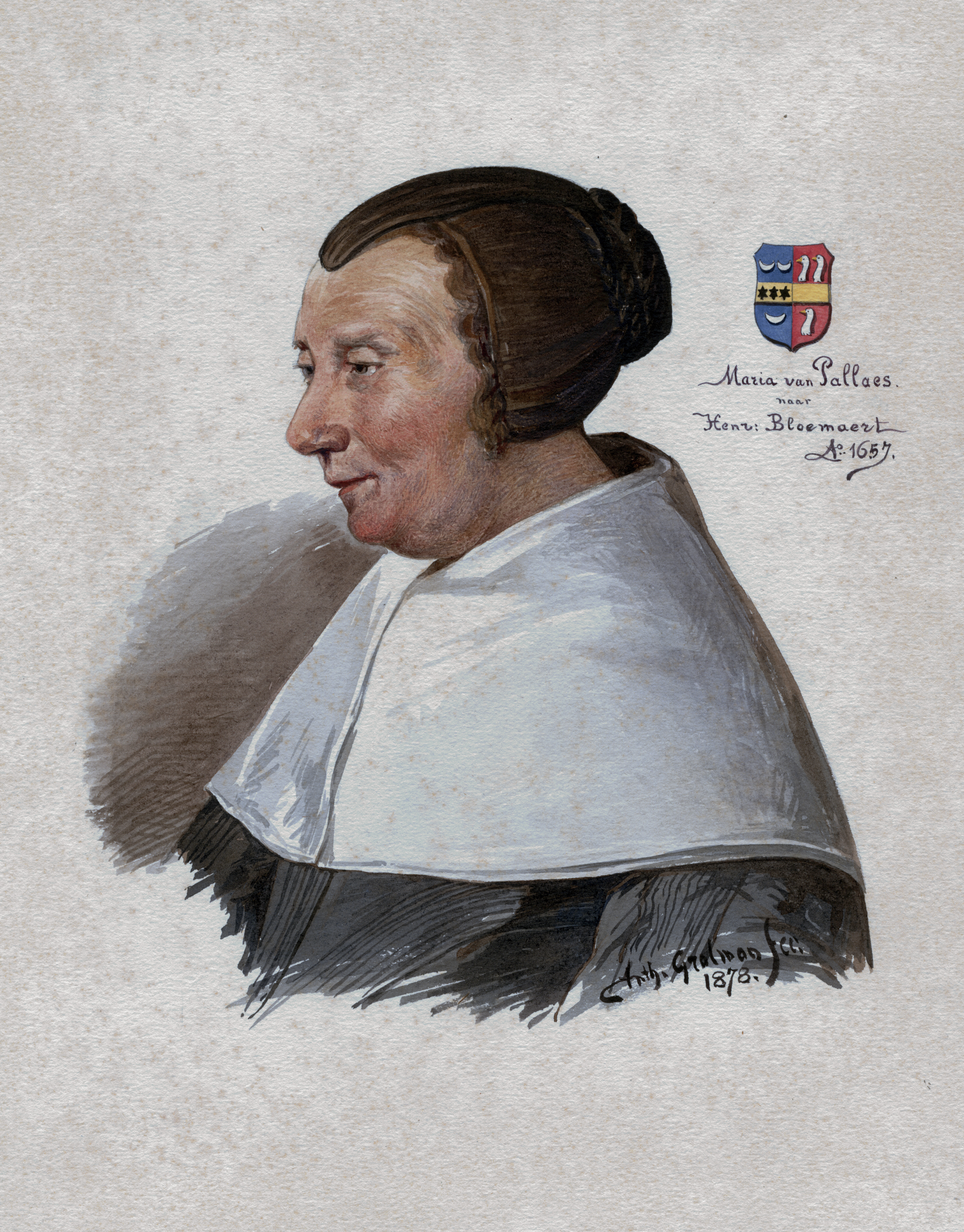 Maria van Pallaes, geboren 1587, echtenote van H. van Schroyestein; stichteres van de kameren van Pallaes, overleden 1664. penseel in kleur (waterverf) 195 x 187 mm